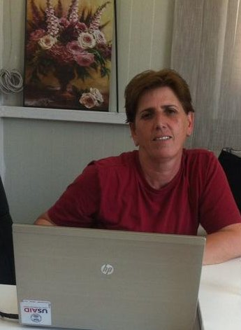 Fahrije Hoti në punë